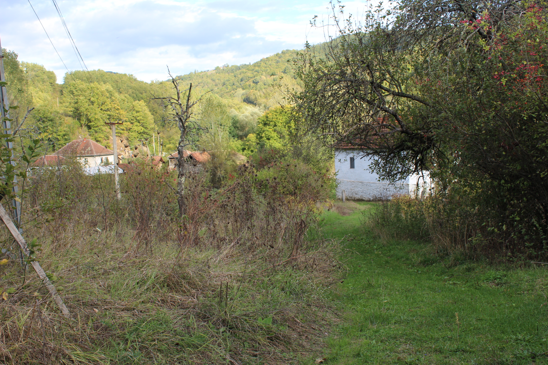 Srpski (latinica): Selo Petrilje